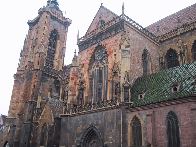 Münster von Colmar, Elsass, Frankreich.